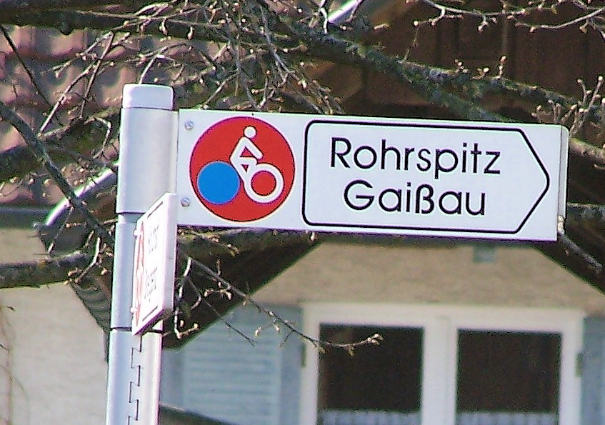 Bodenseeradweg Schild in Österreich